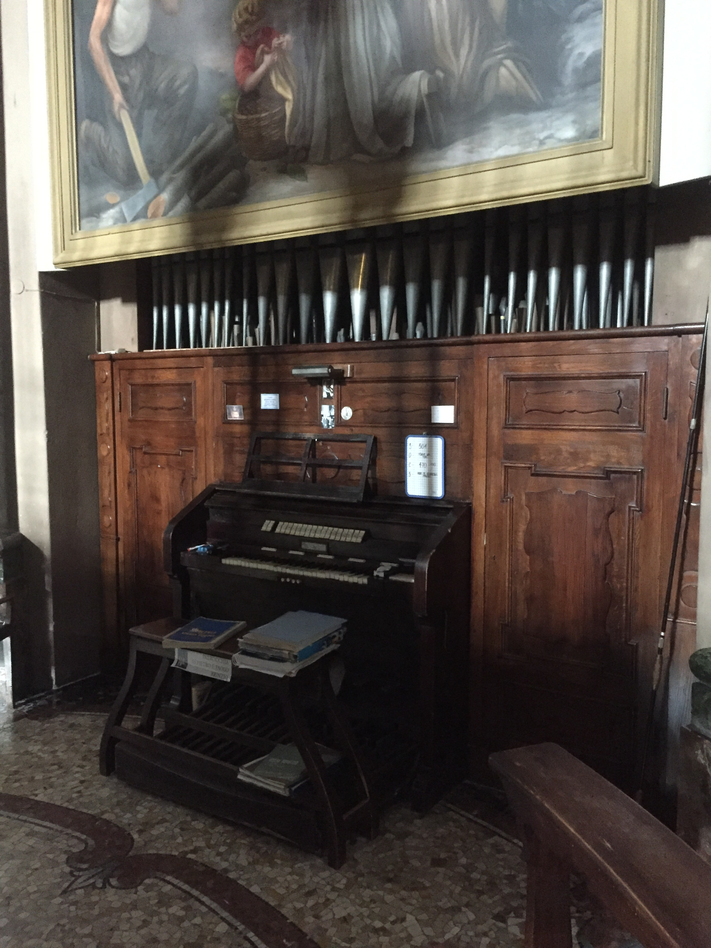 La console dell'organo della chiesa dei SS Pietro e Paolo di Brinzio (VA), Italia